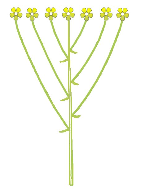 (tuil bloeiwijze) Inflorescence